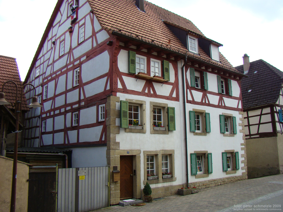 Historisches Gebäude Altstadtstraße 30-32 in Eppingen